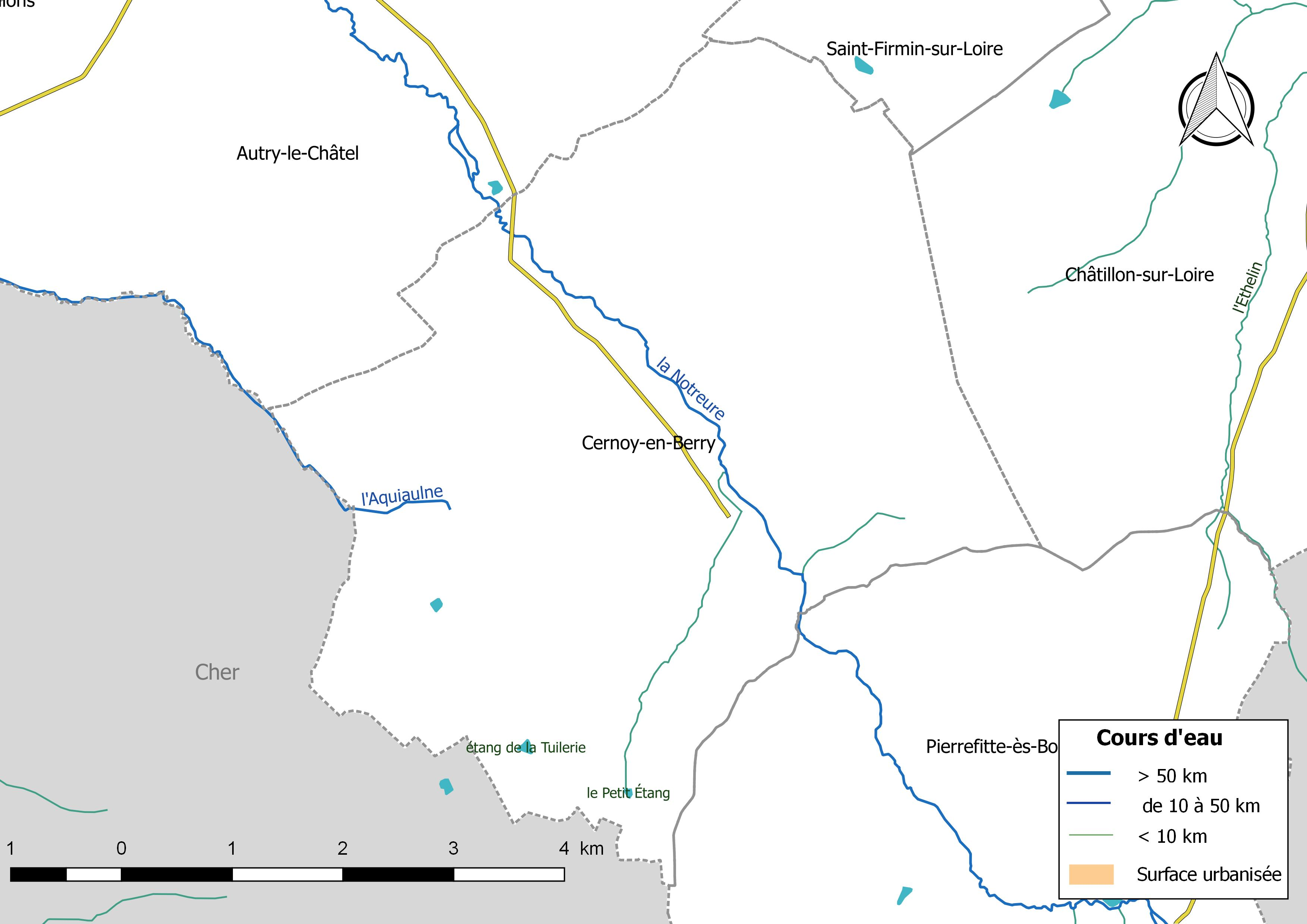 Carte du réseau hydrographique de la commune de Cernoy-en-Berry (France).